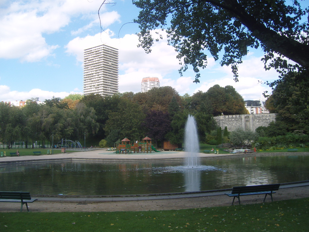 Paris 13e arrondissement - parc Kellermann - vue du bassin vers le nord-est